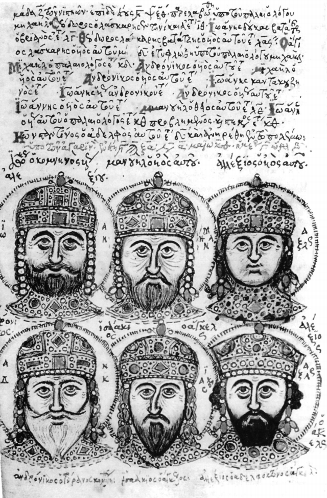 MS Mutinensis gr. 122 f. 293v